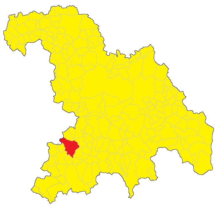 Mappa del comune di Acqui Terme (AL).